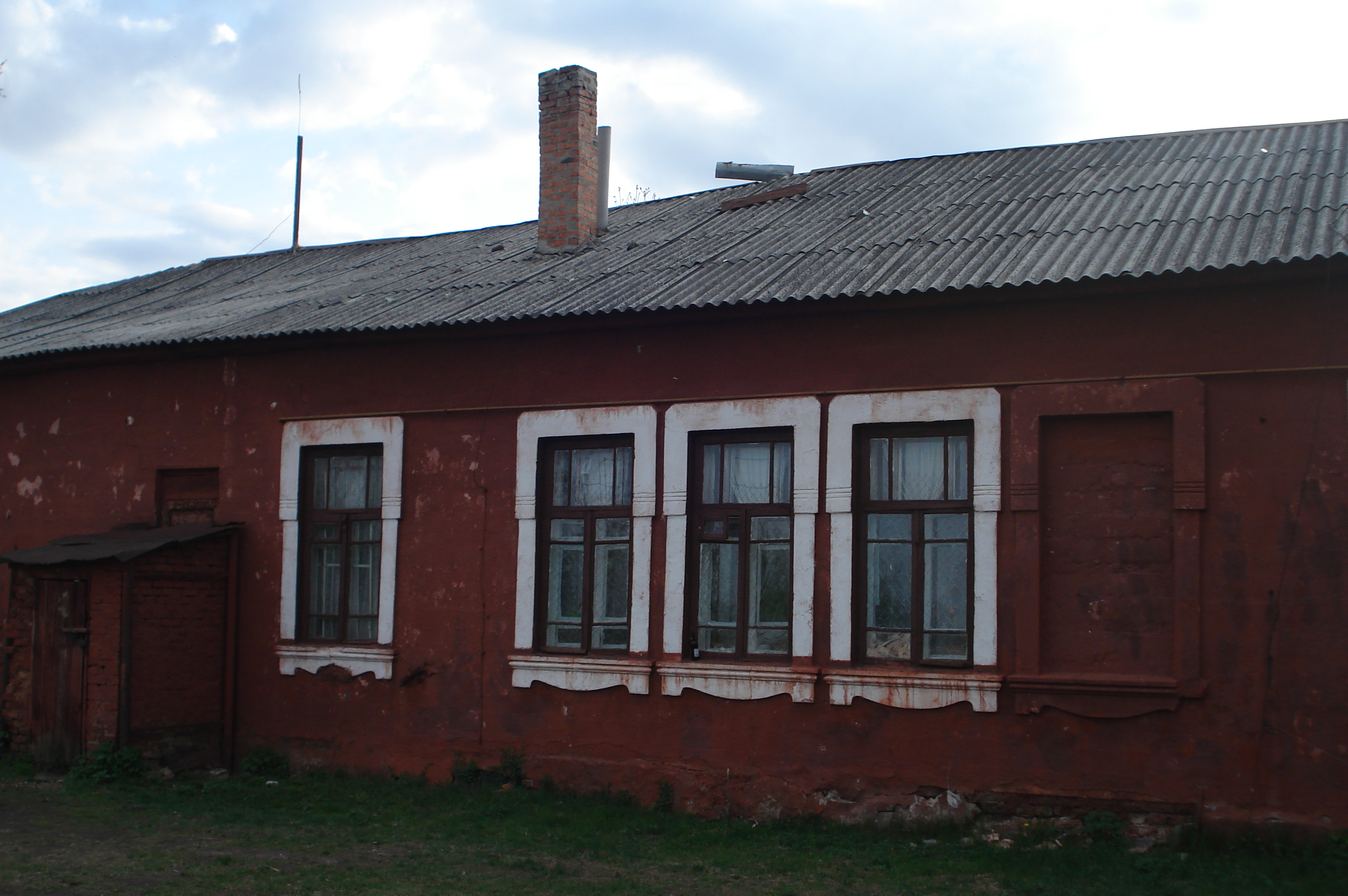 Довоенная и существующая до сих пор школа в Бабаях